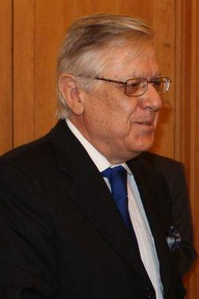 Staatssekretär Reinhold Lopatka trifft chilenischen Vizeaußenminister Alfonso Silva in Lima